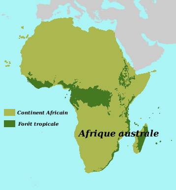 Afrique australe à limite sud de la forêt équatoriale sur le continent africain.